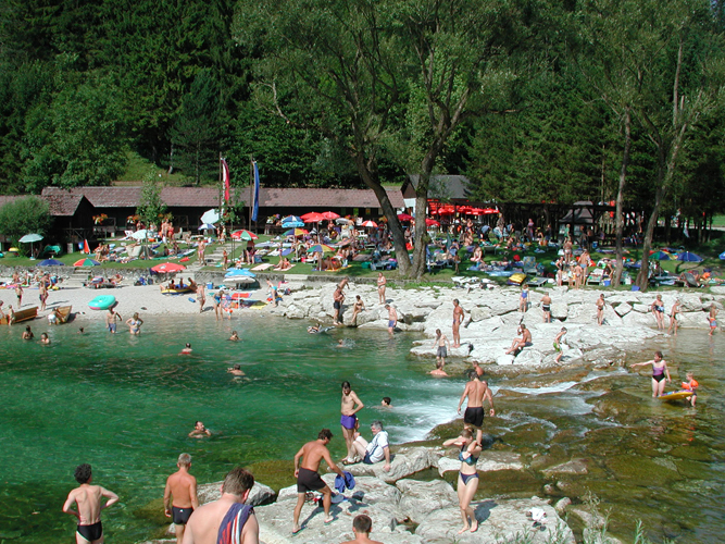 Das historische Strandbad in Hollenstein an der Ybbs erfreut sich aufgrund seiner idylischen Lage großer Beliebtheit.